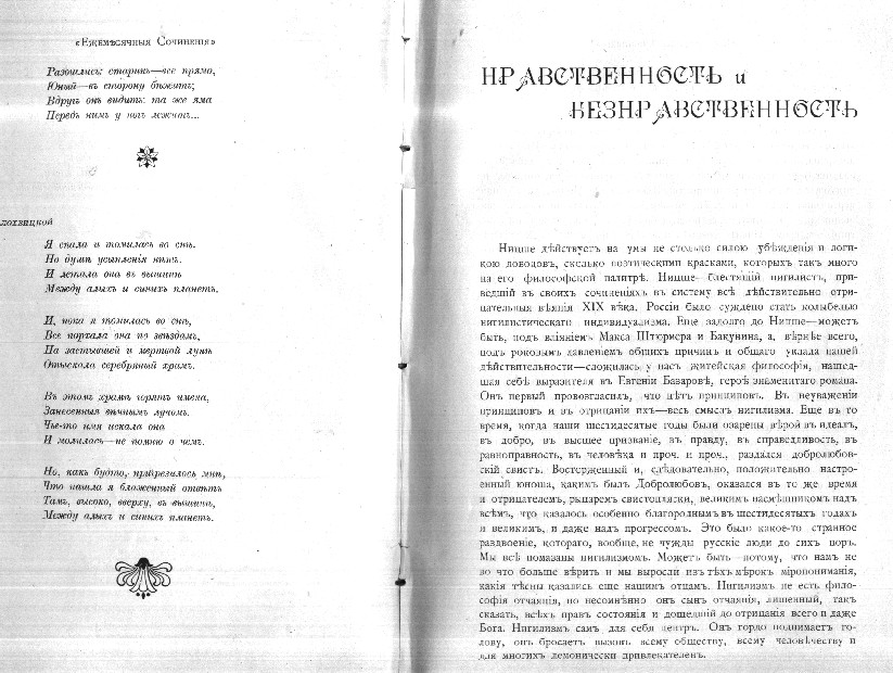 "Нравственность и безнравственность", статья Иеронима Ясинского